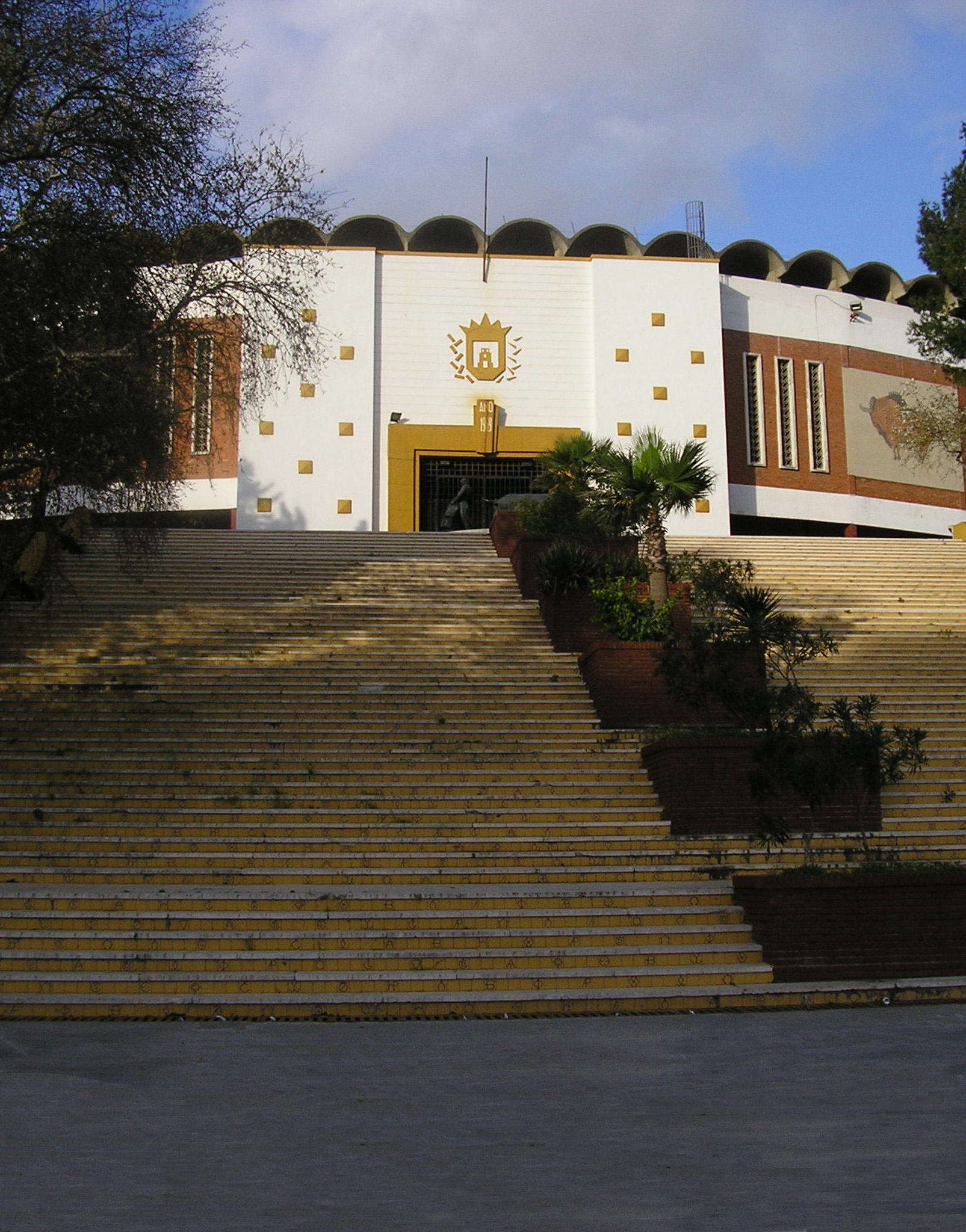 Plaza de toros de Las Palomas de Algeciras, Andalucía, España